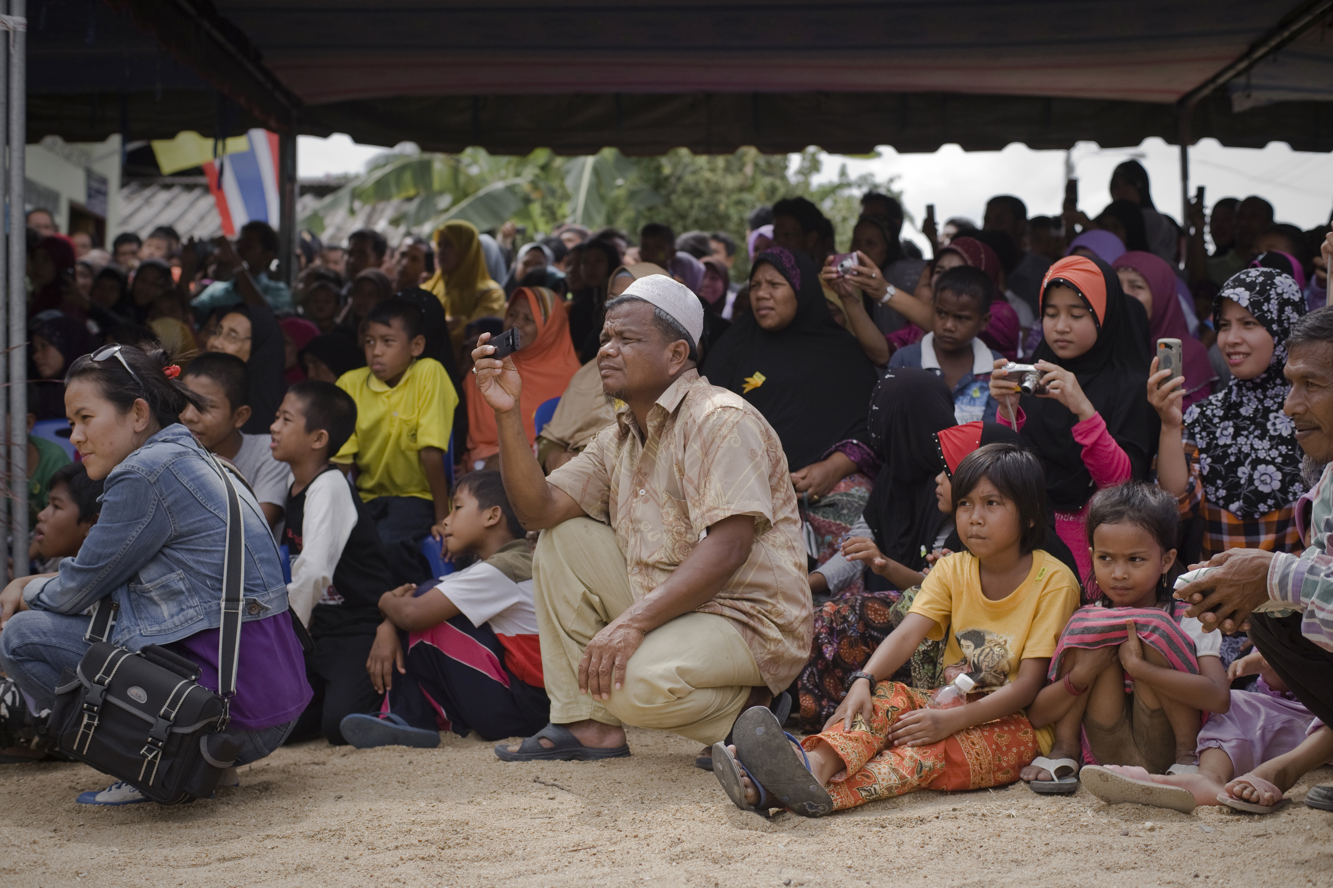 นายกรัฐมนตรี มอบบ้านตามโครงการแก้ไขปัญหาความเดือดร้อนที่อยู่อาศัย ณ บ้านตะโหนด หมู่ที่ 2 ตำบลสุวารี อำเภอรือเสาะ จังหวัดนราธิวาส วันเสาร์ ที่ 30 เมษายน พ.ศ.2554 (Photographer attached to the Prime Minister of the Kingdom of Thailand (H.E.Mr.Abhisit Vejjajiva) : Peerapat Wimolrungkarat / พีรพัฒน์ วิมลรังครัตน์) @is50mm